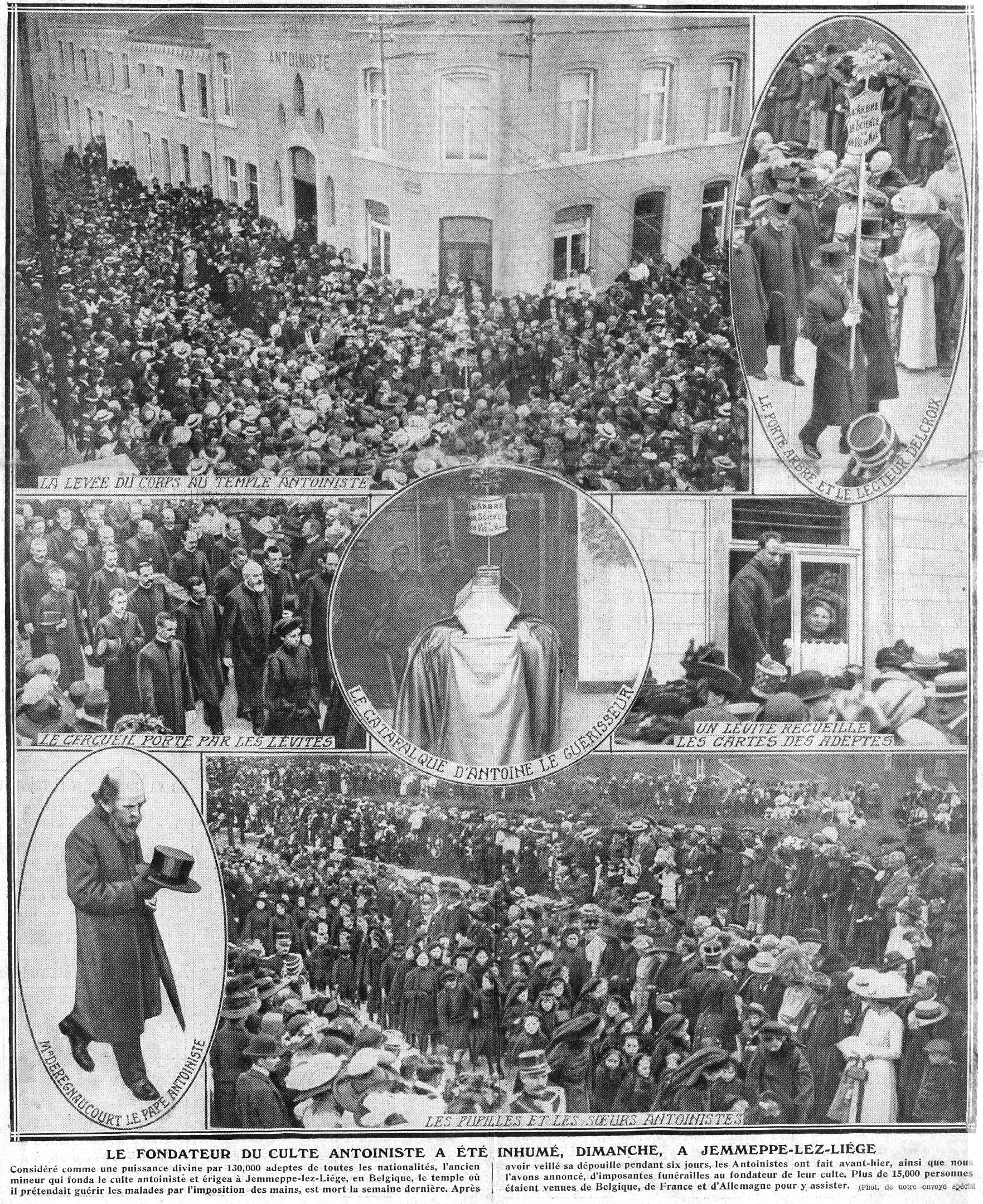 Les funérailles d'Antoine le guérisseur.